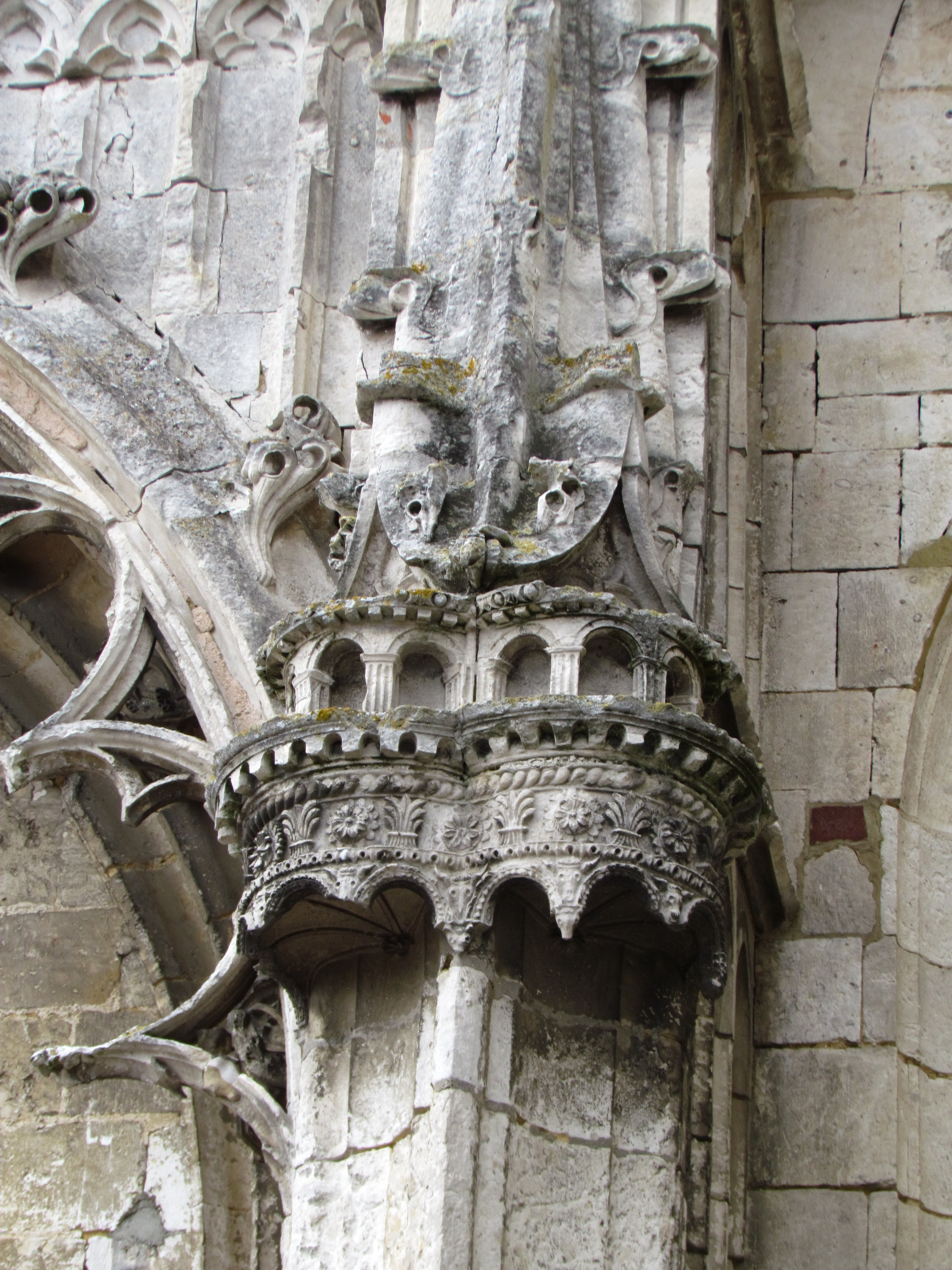 Église Saint-Denis de Paillart, (Classé, 1992) .